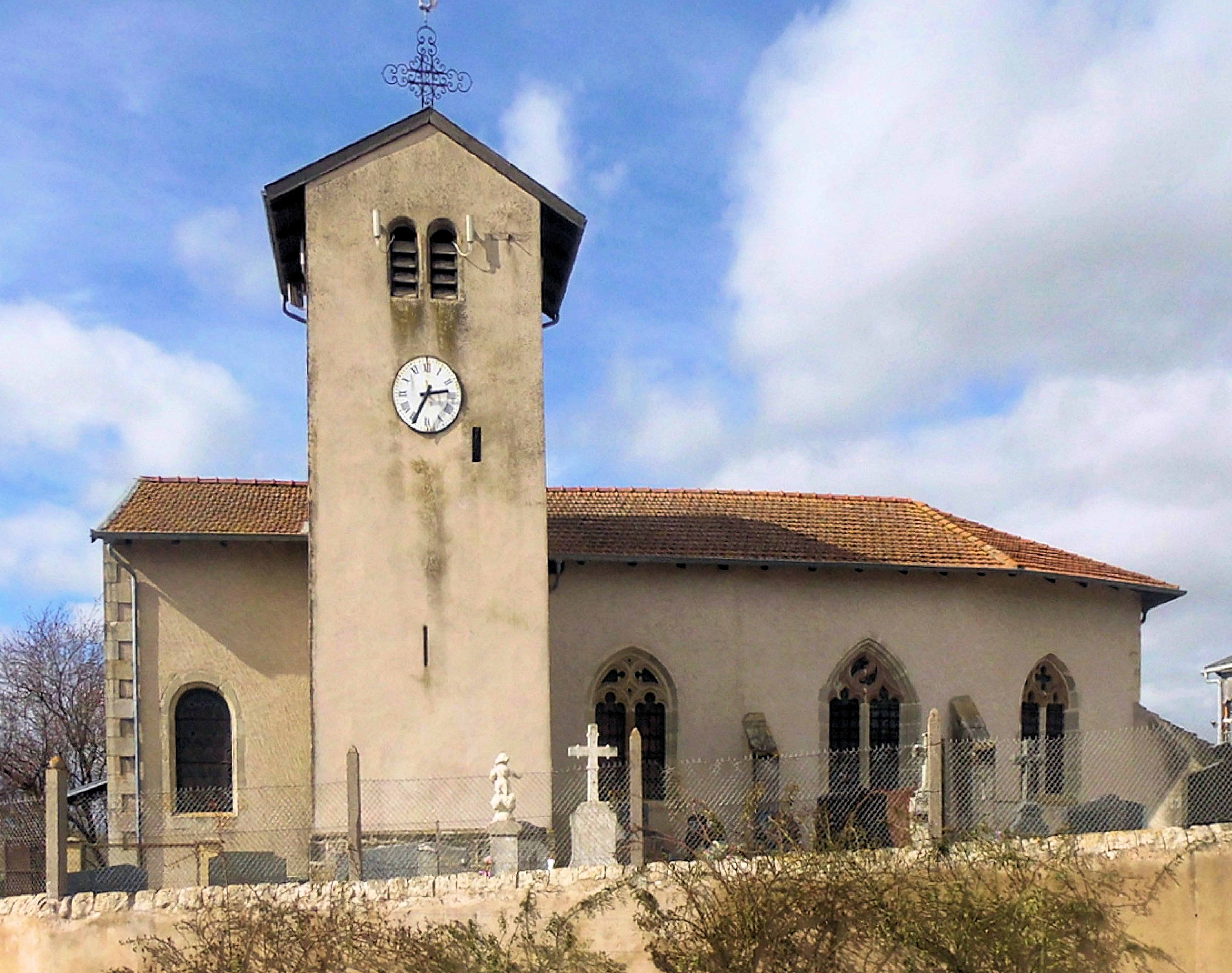 L'église Saint-Sigismond de Landécourt